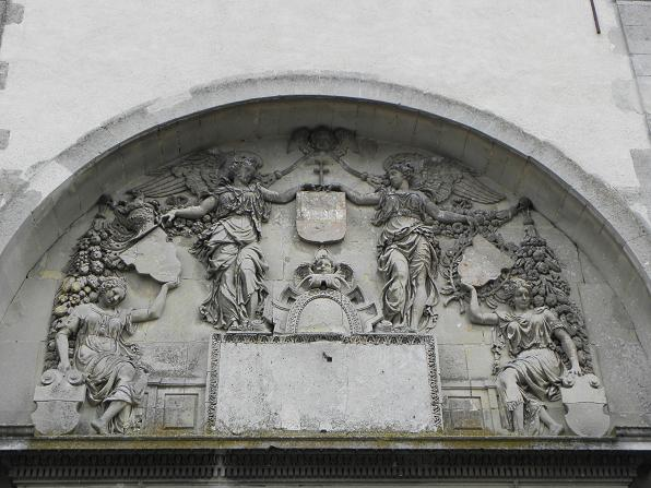 Église de Nantouillet (77) Tympan du portail occidental.